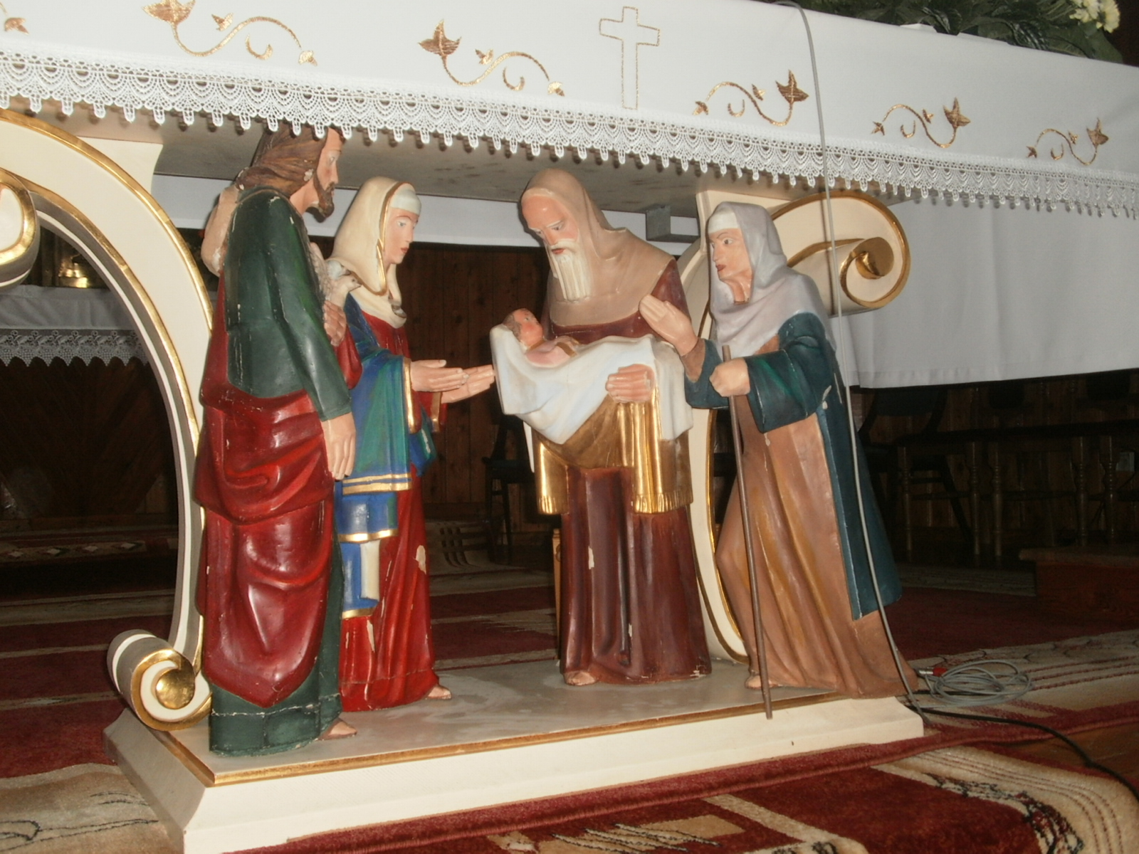 zespół kościoła cmentarnego p.w. św. Jakuba: drewniany kościół, 1563 cmentarz Rozdziele